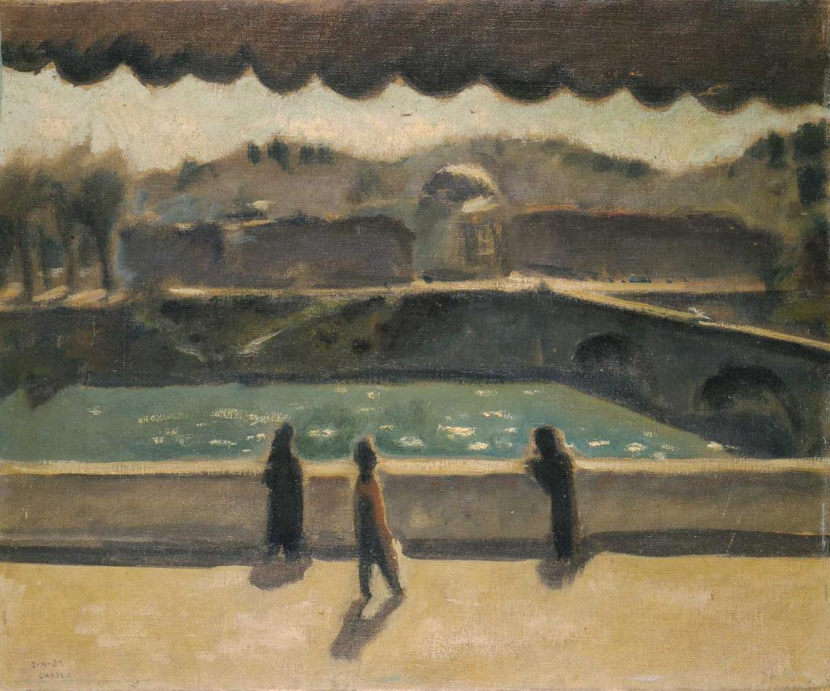 Gigi Chessa, Mezzogiorno (Meriggio), Olio su tela, 50.4 x 60.3 cm